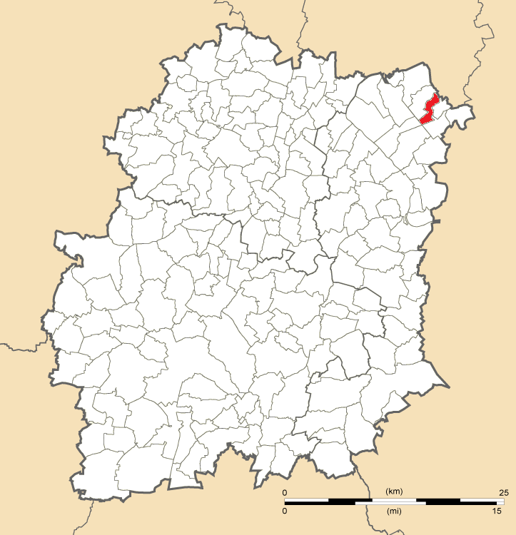 Carte de position d'Épinay-sous-Sénart en Essonne (91)